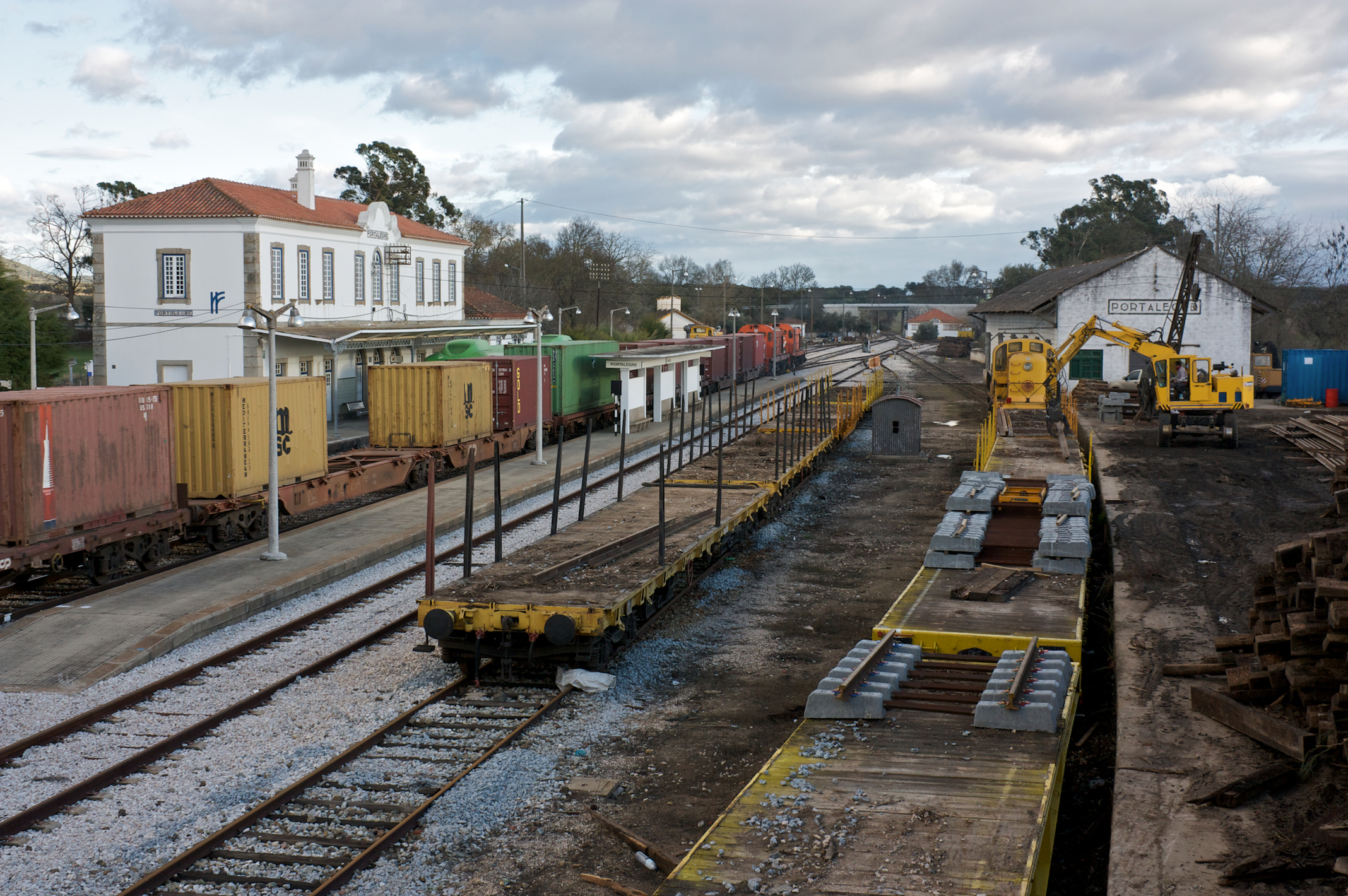 Tipo: E [Estação] Local: Portalegre-Gare [Linha do Leste, PK 216 • Linha de Évora, PK 239] Data e hora: 9 de Dezembro de 2008 [15h50]